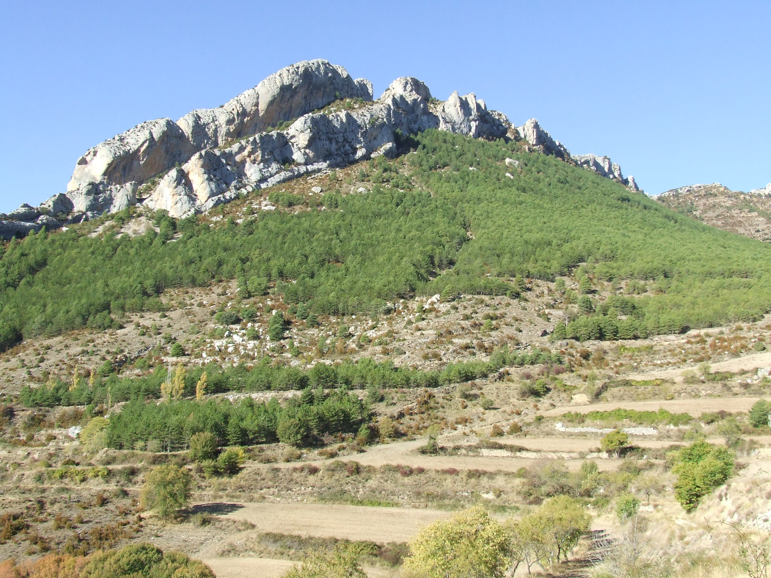 La Serra de Monteguida (Abella de la Conca, Pallars Jussà)